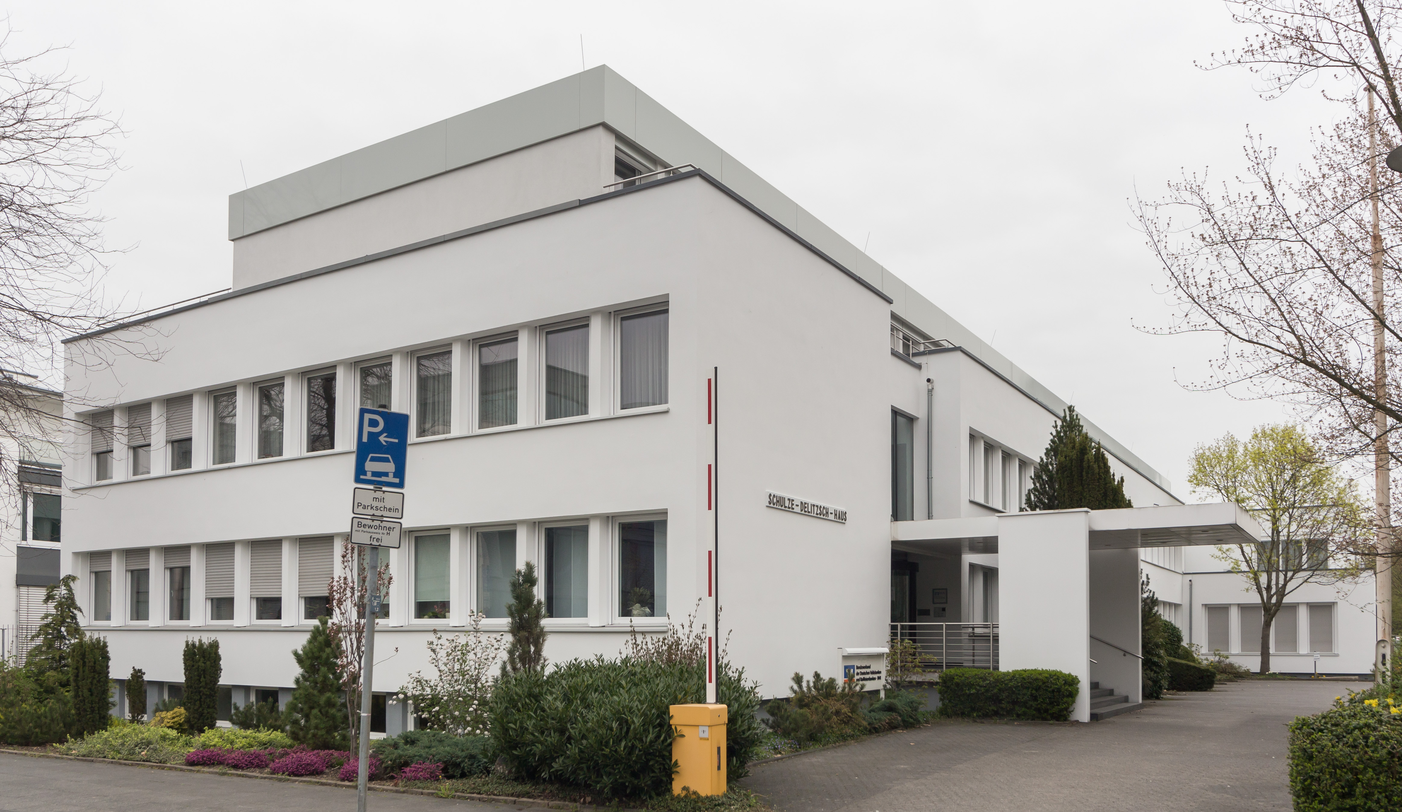 Schulze-Delitzsch-Haus (erbaut 1953/54; ehem. Sitz des Bundesverbands der Deutschen Volksbanken und Raiffeisenbanken), Heussallee 5, Bonn